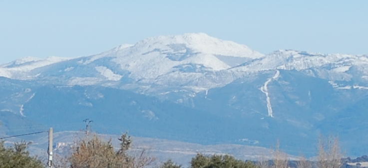 Pico de la Tornera (Sierra del Lobosillo)